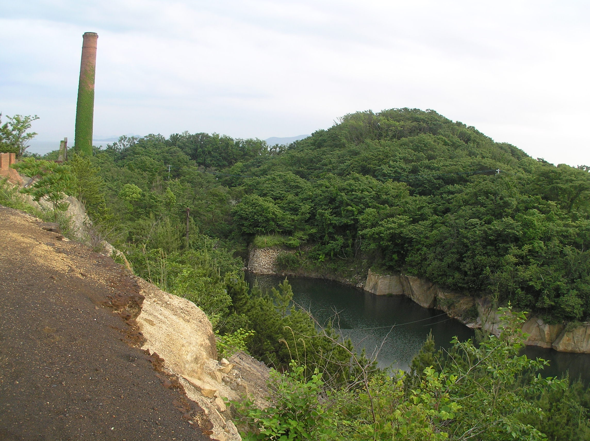 2004-05-22 Inujima,犬島